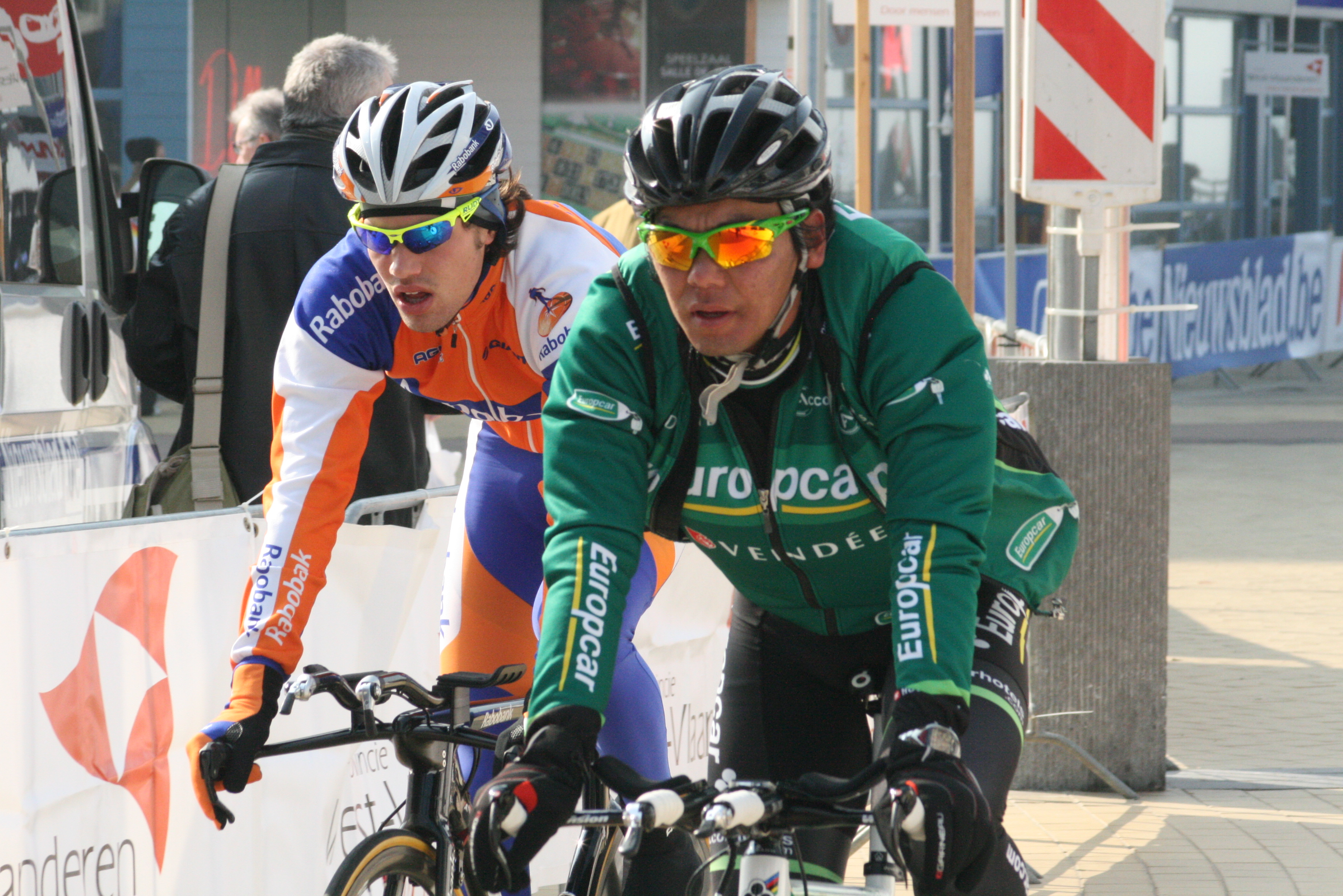 Driedaagse van West-Vlaanderen 2011, proloog in Middelkerke